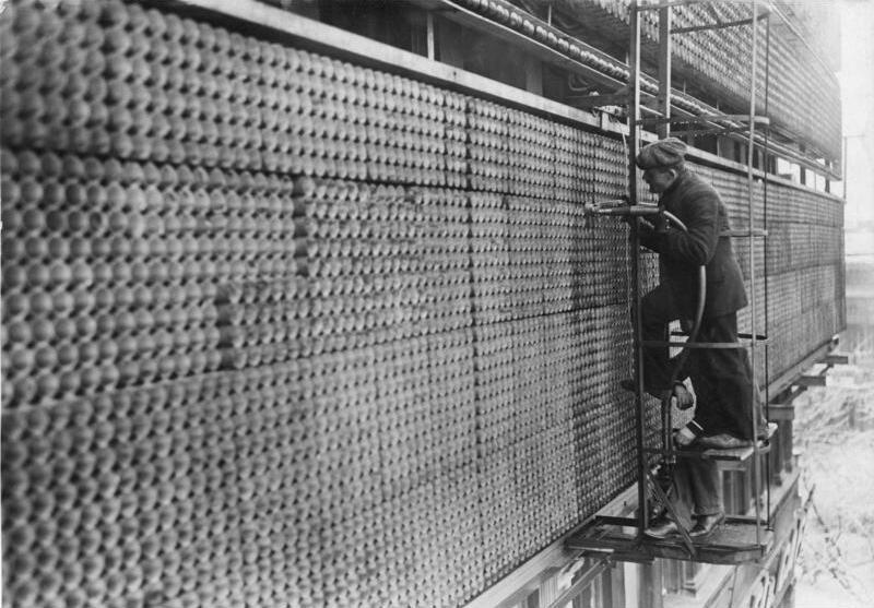 Keine Honigwaben ,---sondern die größte Wanderschrift Deutschlands! Dieselbe befindet sich auf dem Potsdamer Platz in Berlin. Die Anlage umfäßt über 10.000 Glühbirnen, welche allabendlich in Wanderschrift Tagesneuheiten und Reklame dem Publikum übermitteln. Arbeiter an der größten Wanderschrift Deutschlands beim Auswechseln schadhafter Birnen.